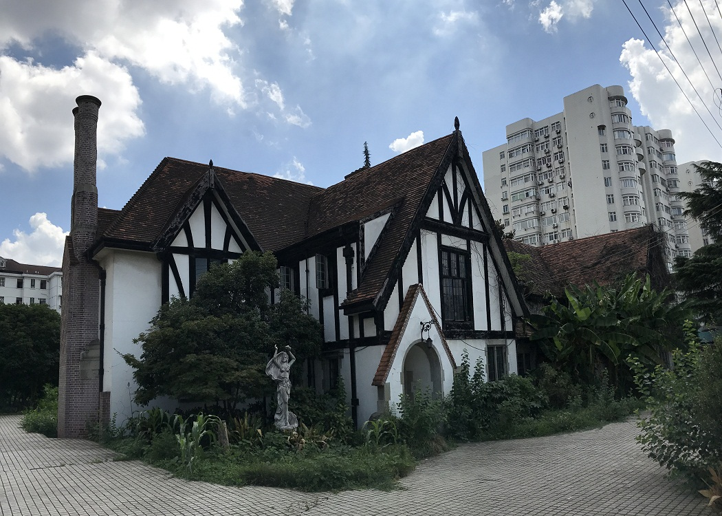 虹桥路2310号住宅 虹桥路2310号 20世纪40年代初